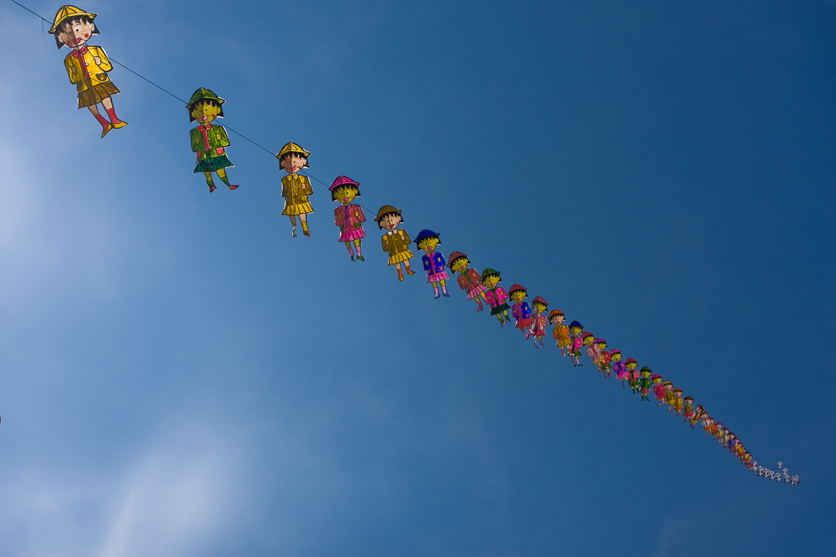 Vũng Tàu Kite Festival 2009